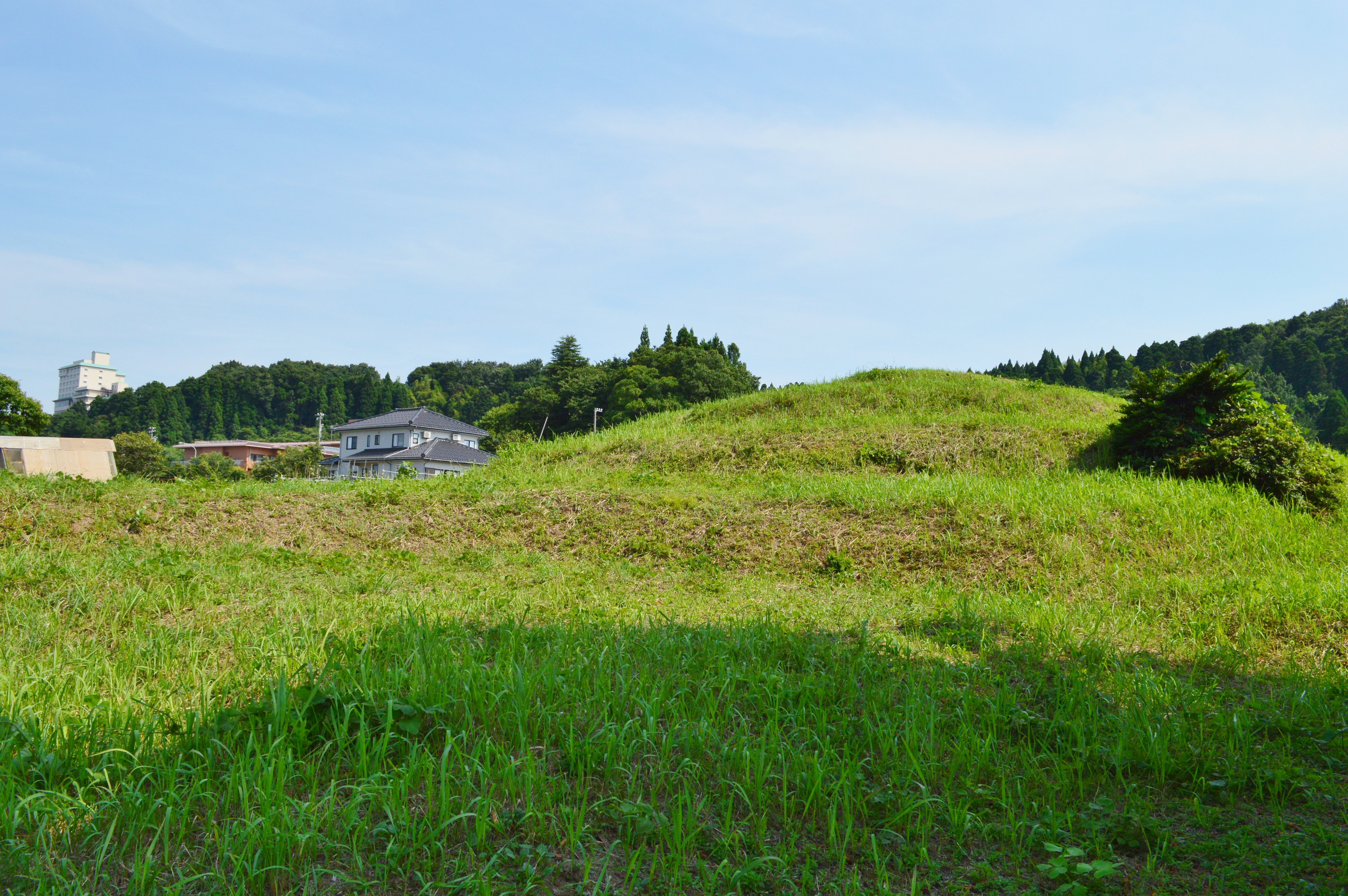 桜谷2号墳 (高岡市) 墳丘